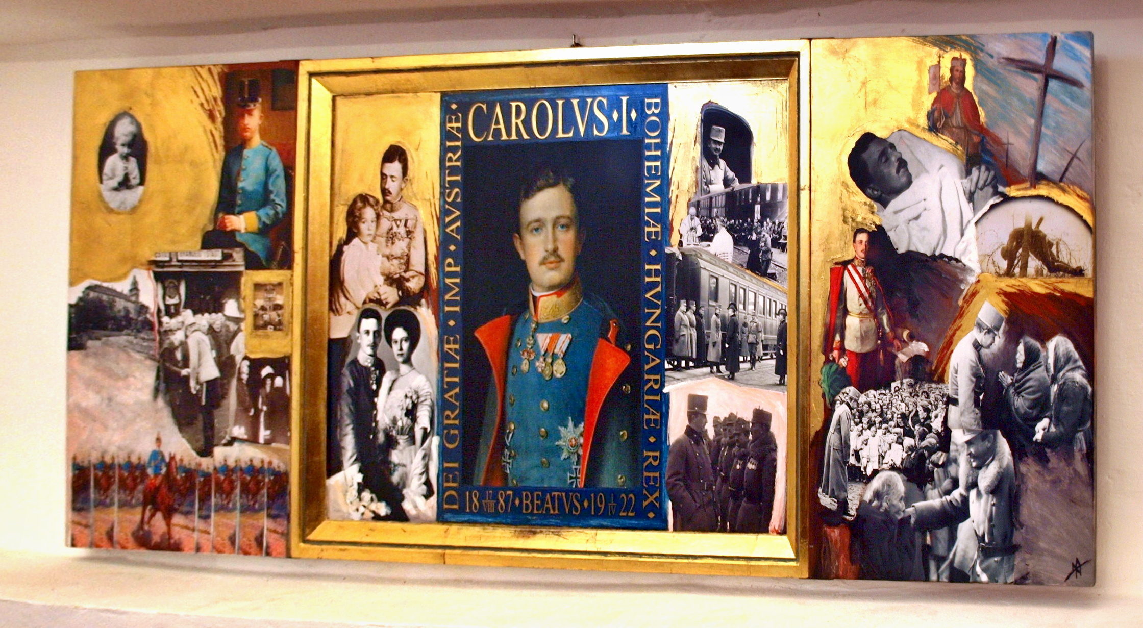 Kaple blahoslaveného císaře Karla I. ve Staré Boleslavi